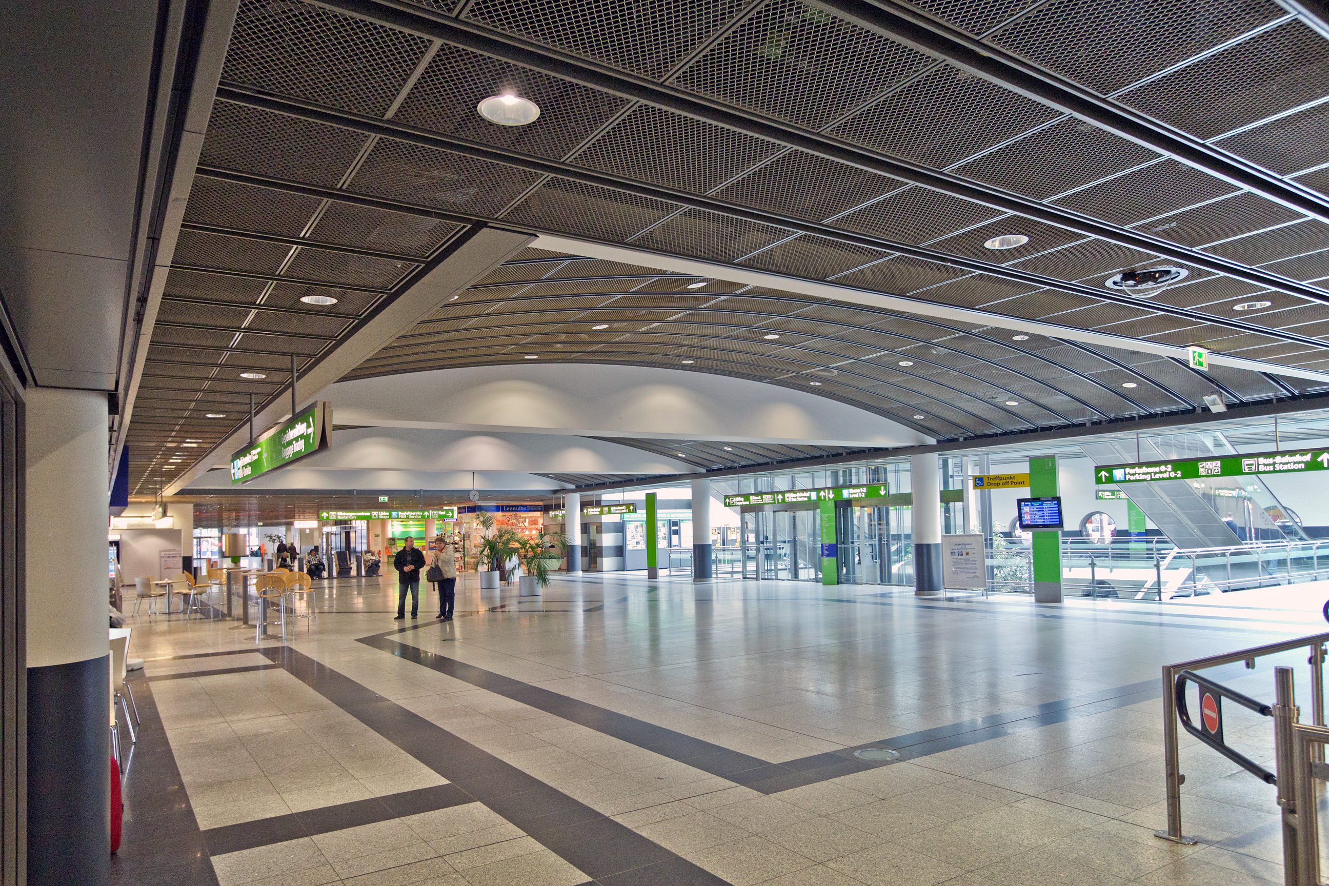 Ankunftsbereich im Flughafen Dortmund.